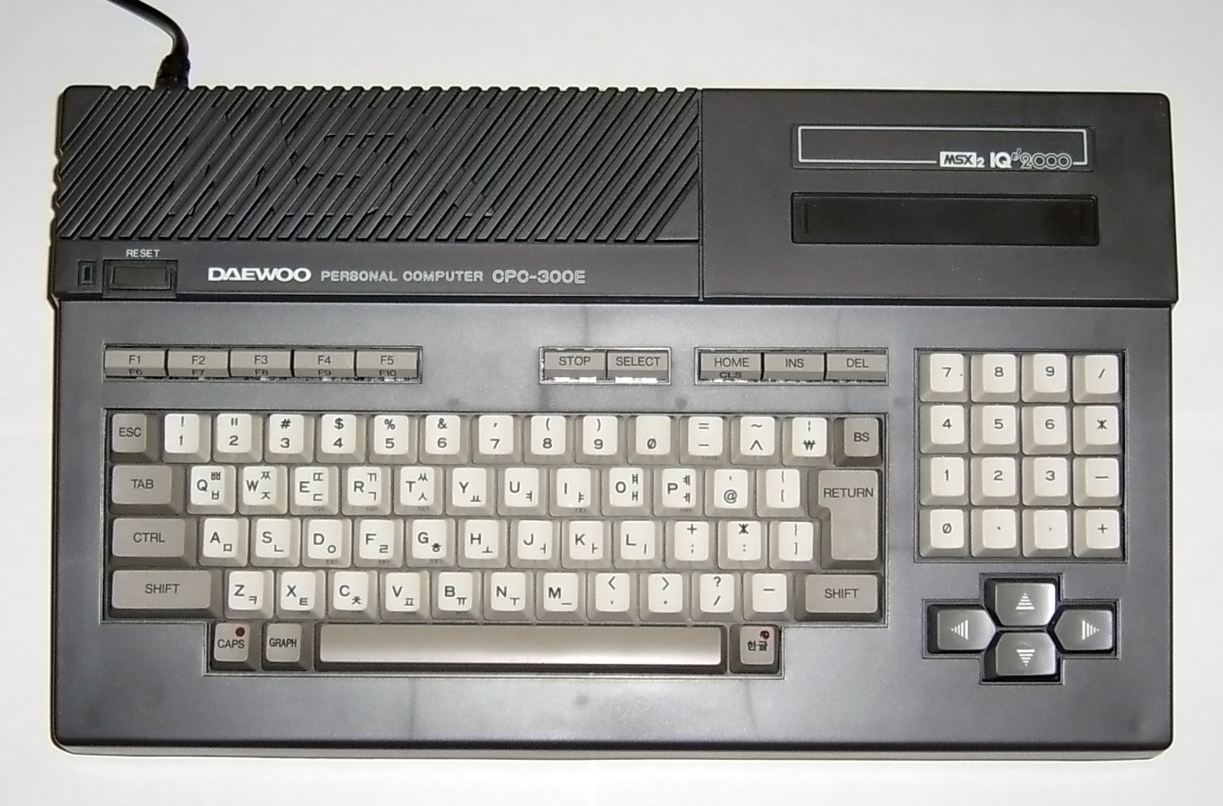 Внешний вид компьютера Daewoo CPC-300E.